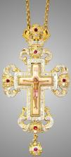 Произведен на Художественно-производственном предприятии Русской православной церкви "Софрино"